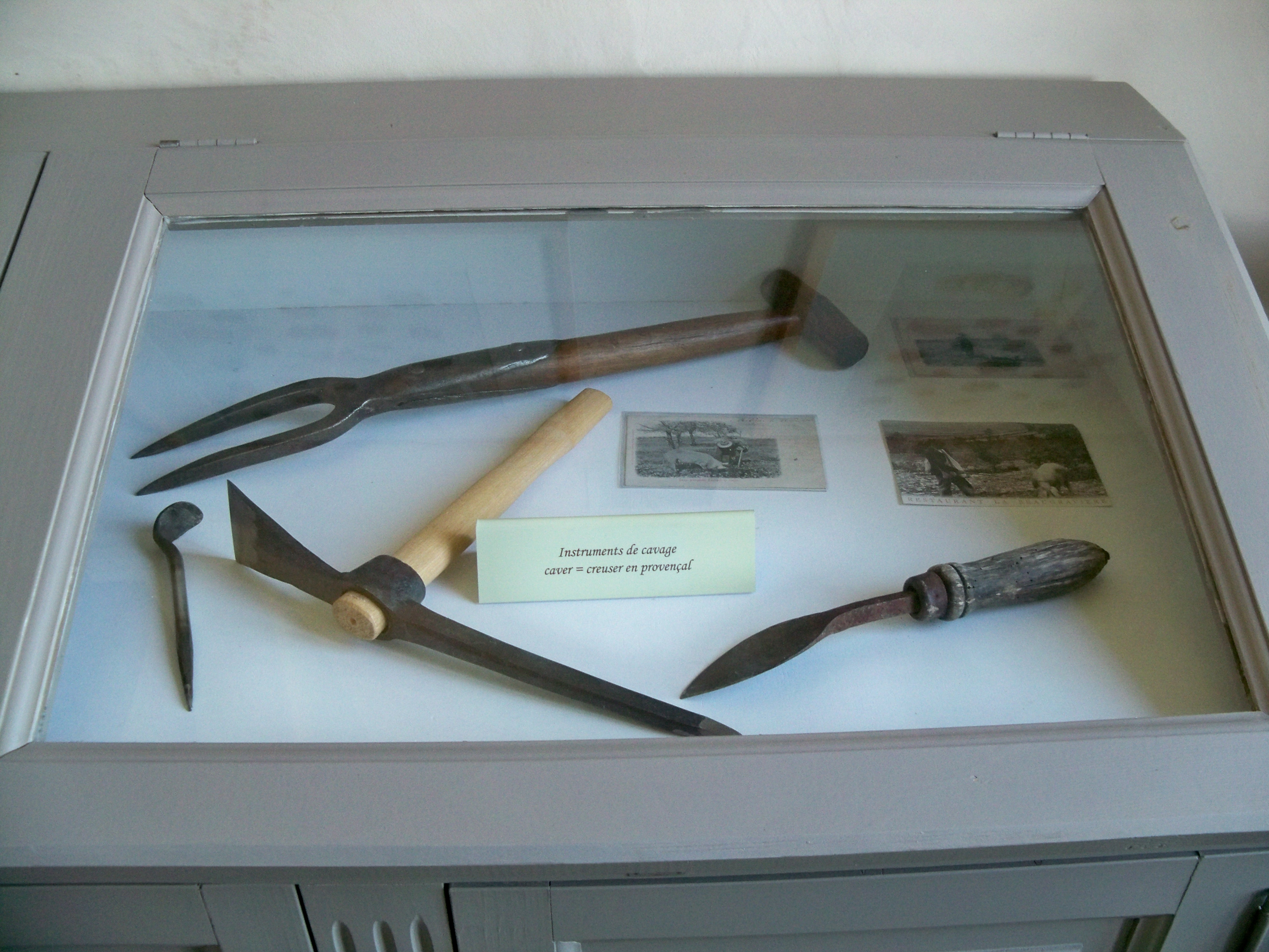 outils de cavage, pour la recherches de truffes